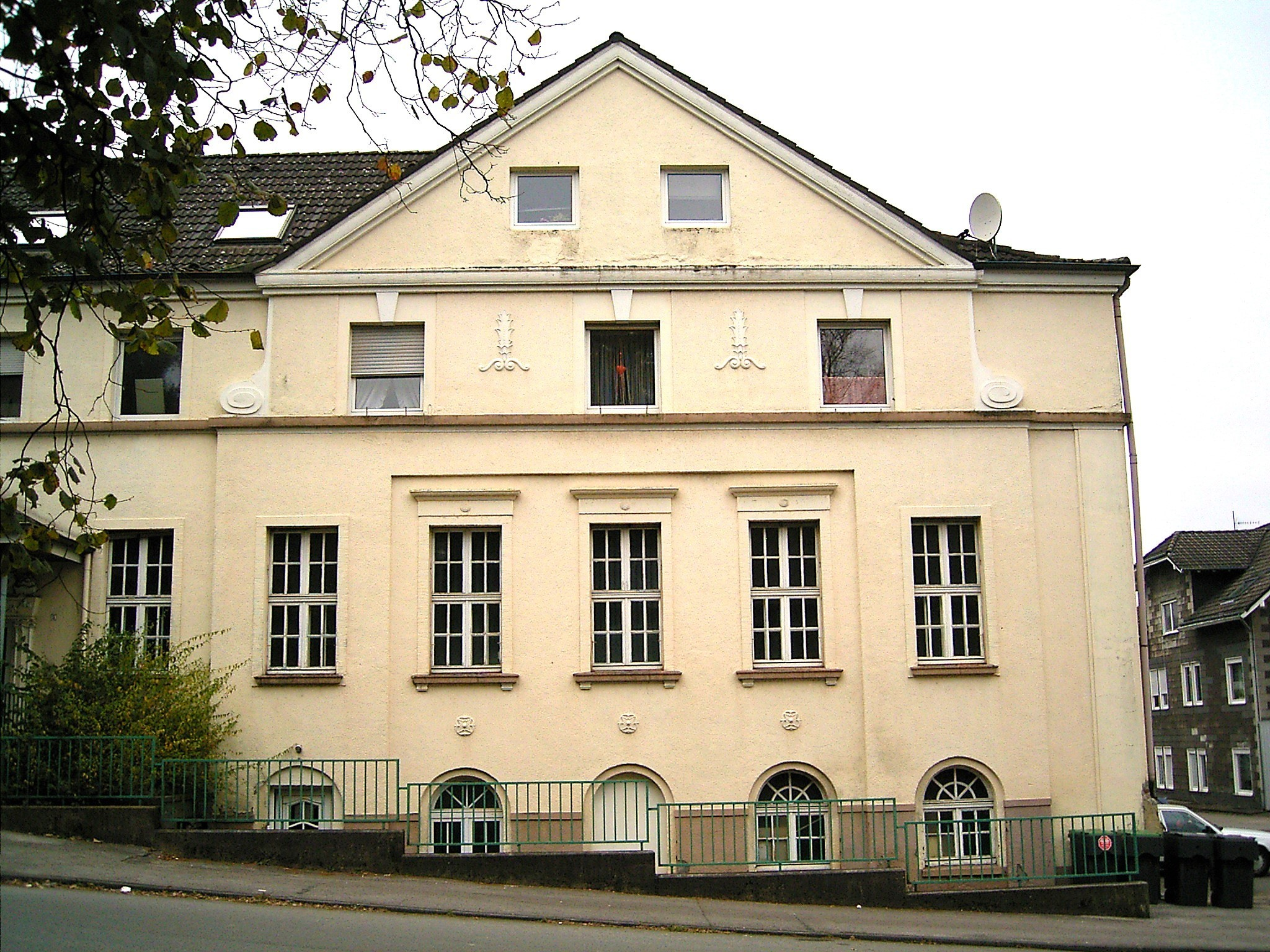 Radevormwald